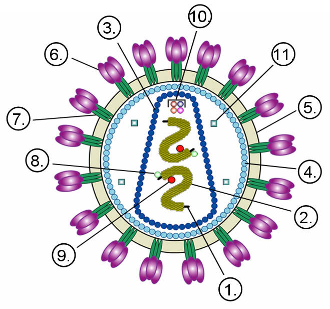 HIV virion